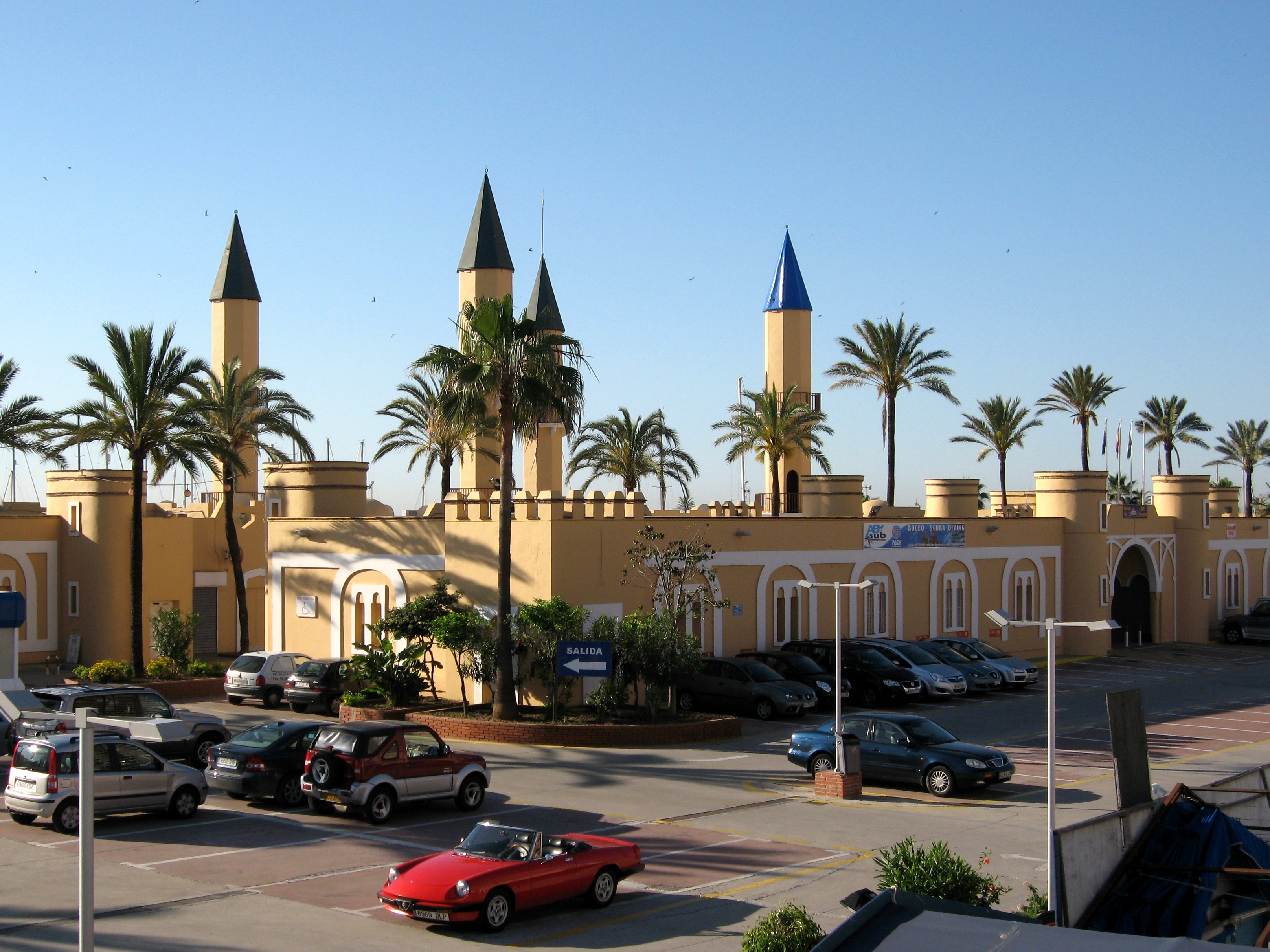 Hafengebäude von Fuengirola, Provinz Málaga, Andalusien, Spanien